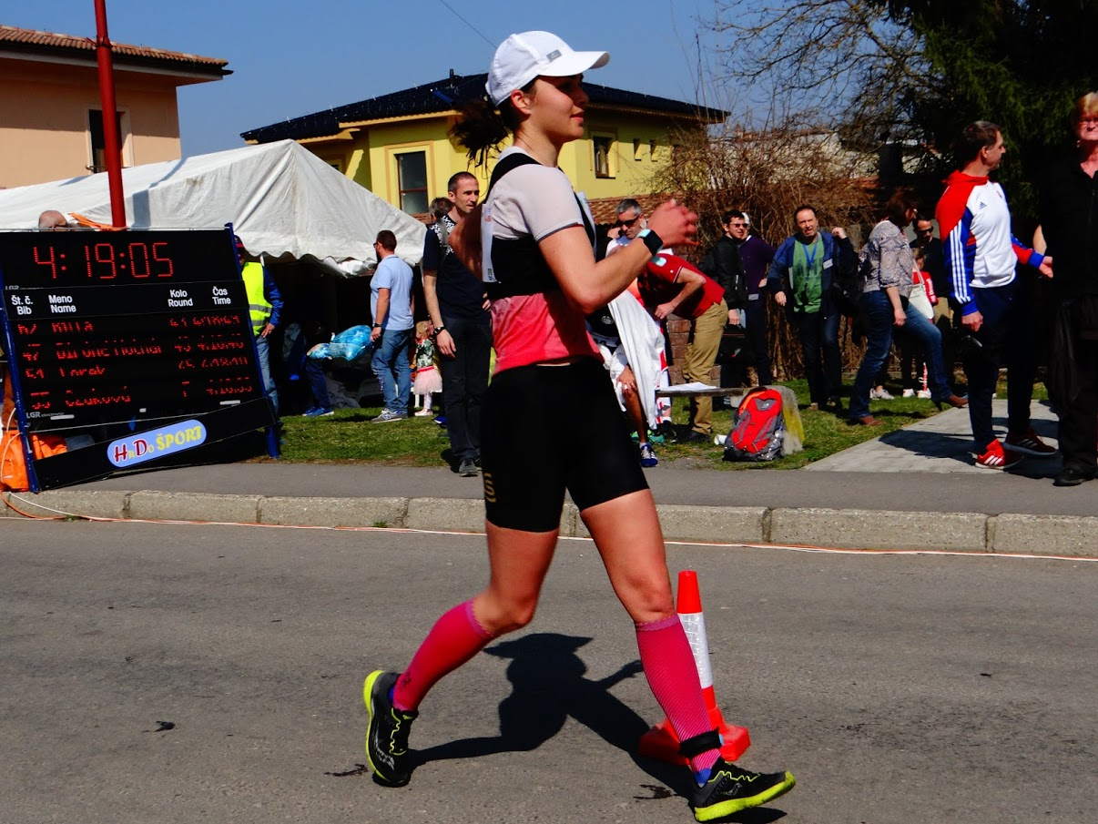 Ivana Renić in the last lap of the race in Dudince about to get the entry standard for the World Championships 2019